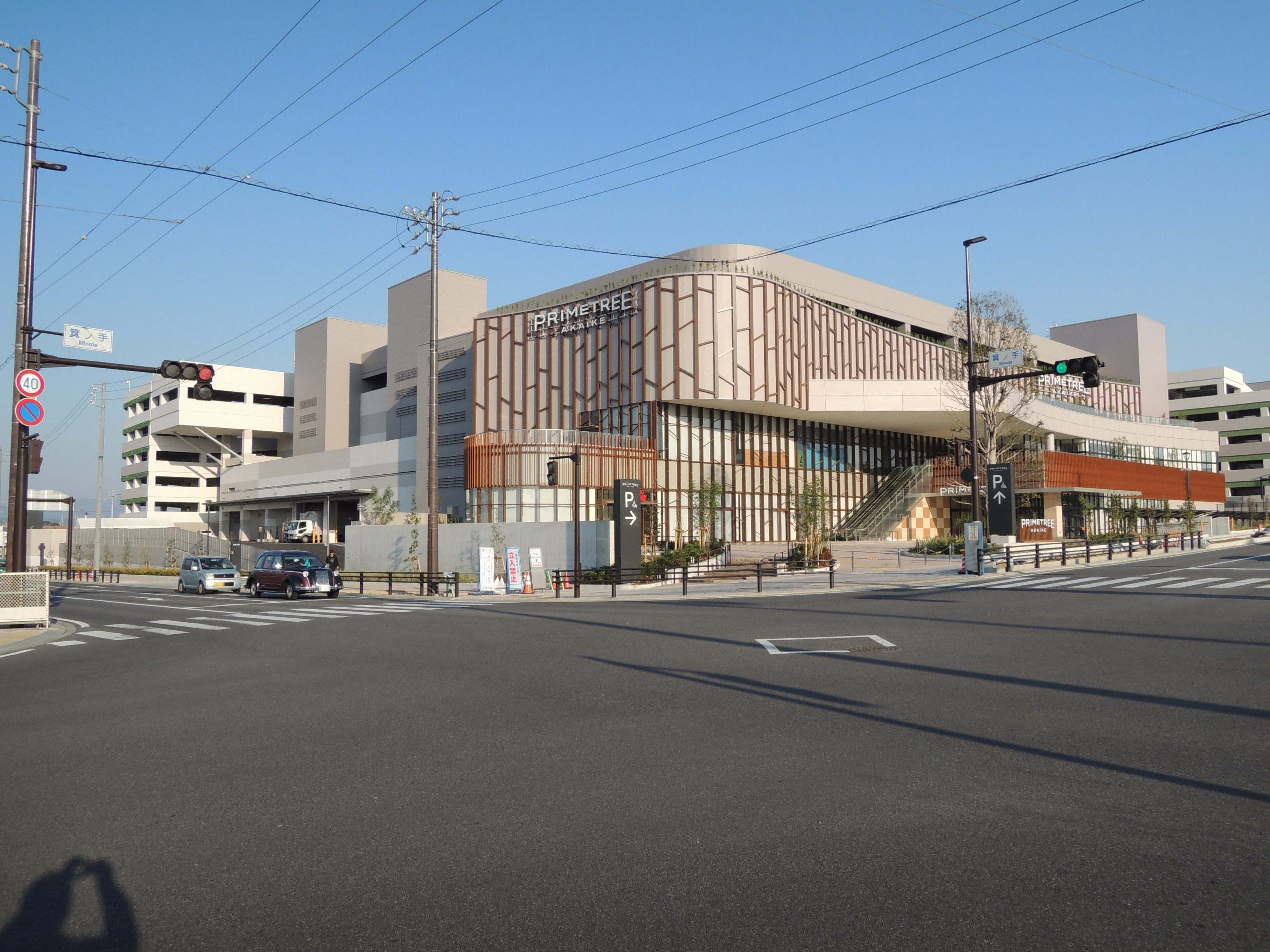 プライムツリー赤池（愛知県日進市） 箕ノ手交差点から撮影